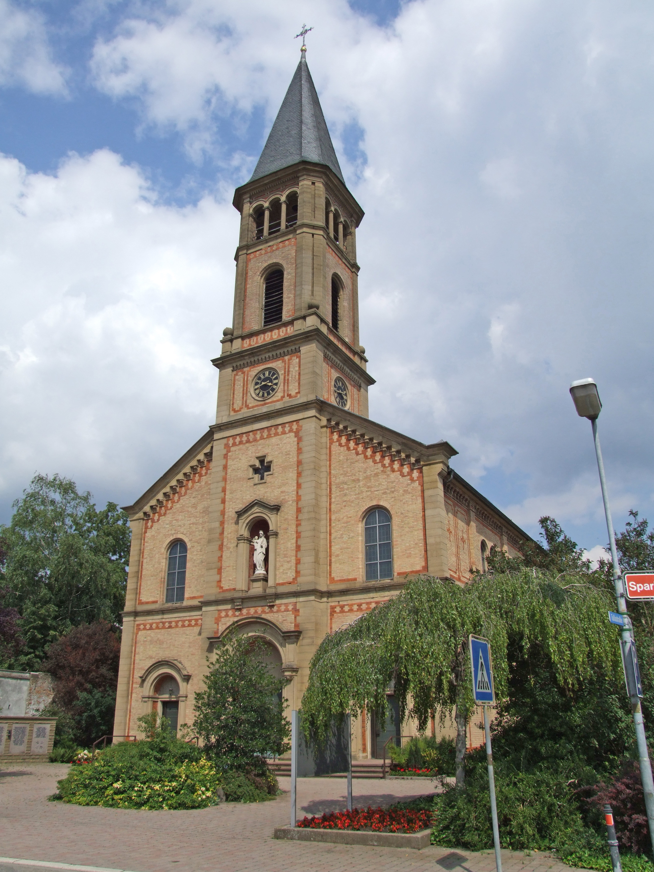 St Laurentiuskierch zu Oberhausen-Rheinhausen